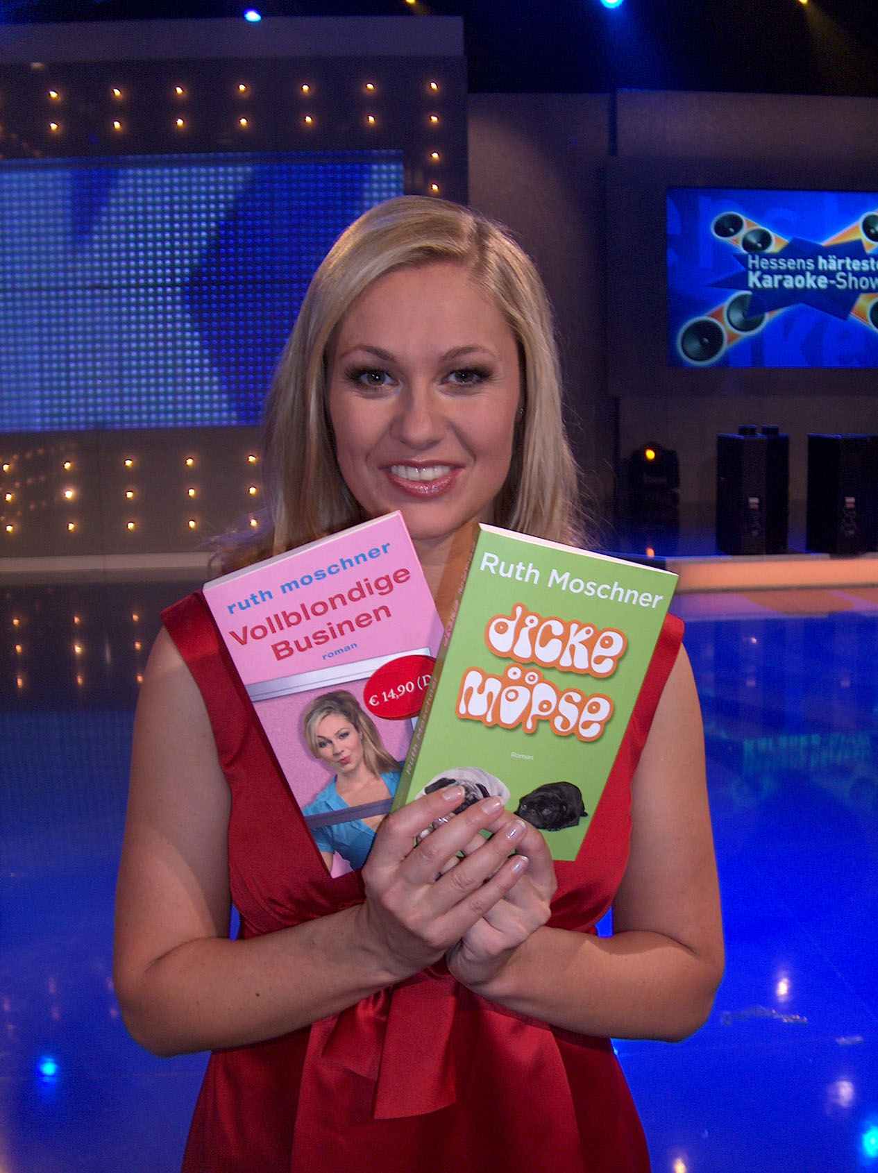 Ruth Moschner mit ihren beiden Romanen "Vollblondige Businen" und "Dicke Möpse" auf dem Hessentag 2009